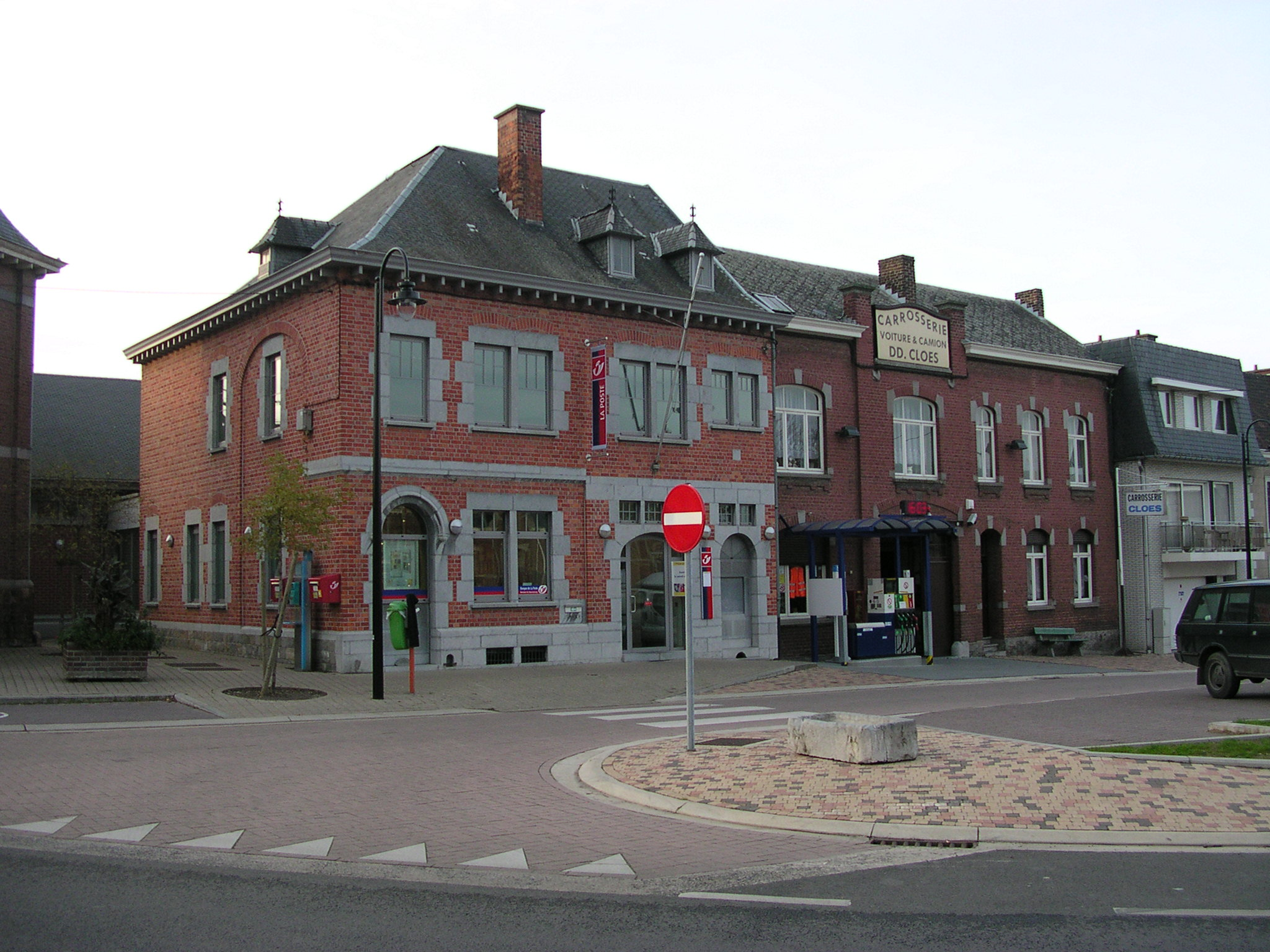 Blegny bei Lüttich